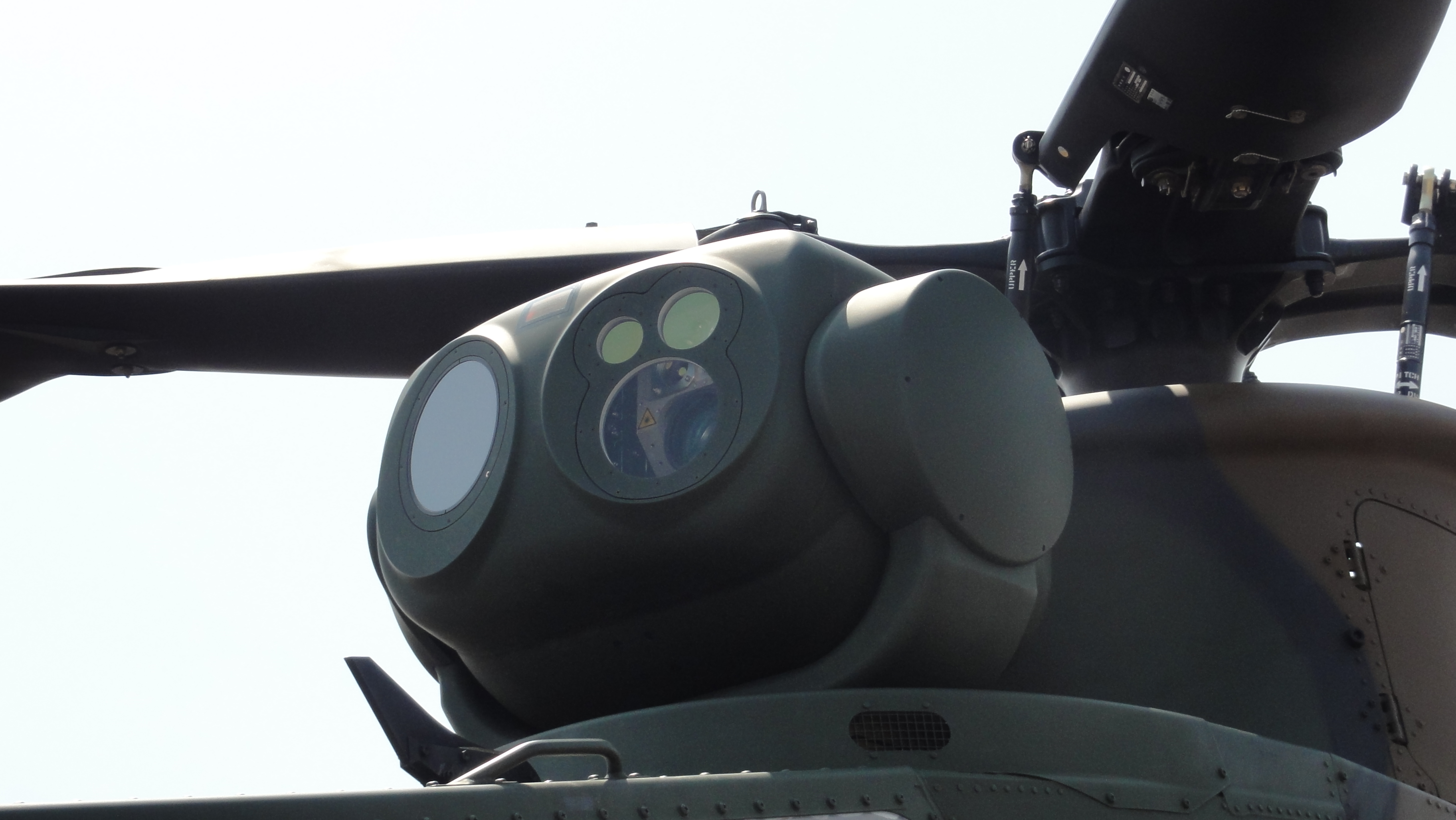 陸上自衛隊 OH-1偵察ヘリコプター 上部偵察サイト。 12年5月5日 米海兵隊岩国基地にて。